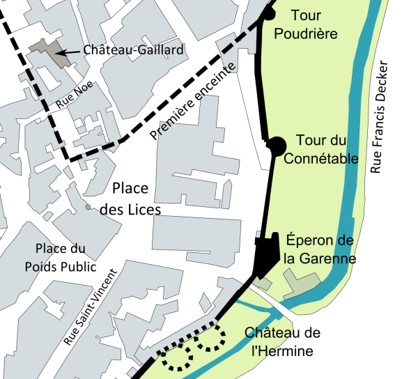 Plan du sud-est de l'intra-muros de Vannes avec indication de l'emplacement de la première enceinte des remparts